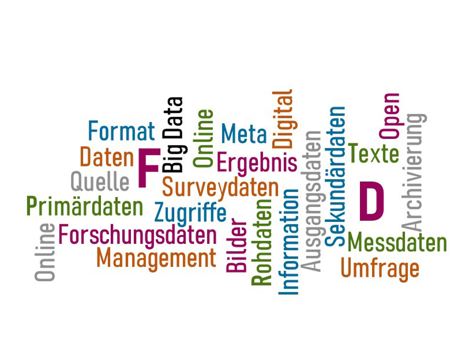 Das Bild wurde für den Wikipedia-Artikel Forschungsdaten kreiert, um die Vielfalt der Begriffe darzustellen